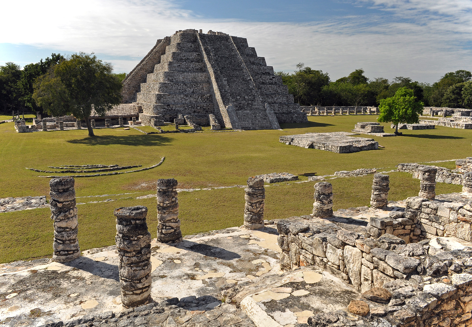 Mayapan